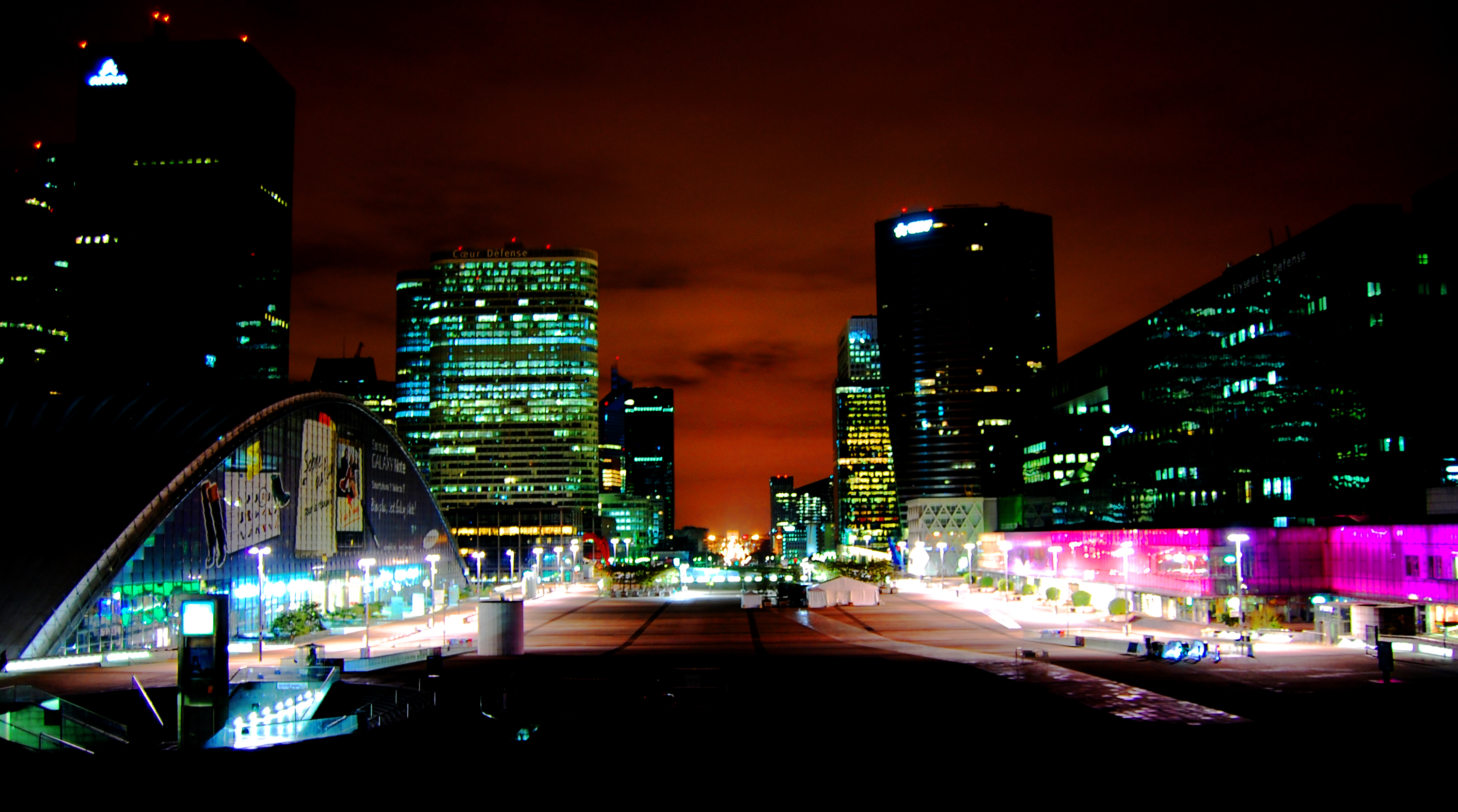 Quartier de la Défense